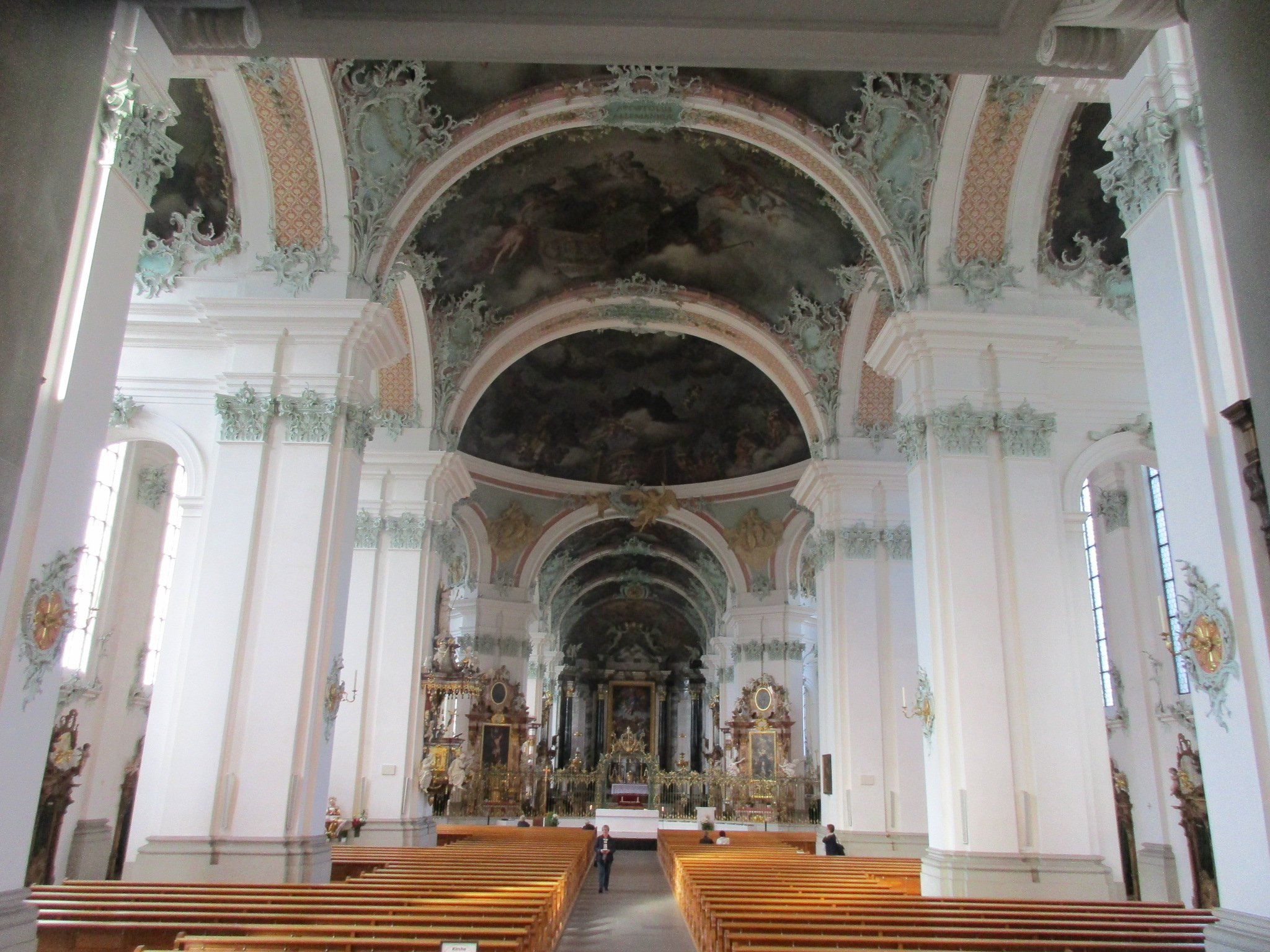 Interior of Stiftskirche St. Gallus und Otmar (St. Gallen)